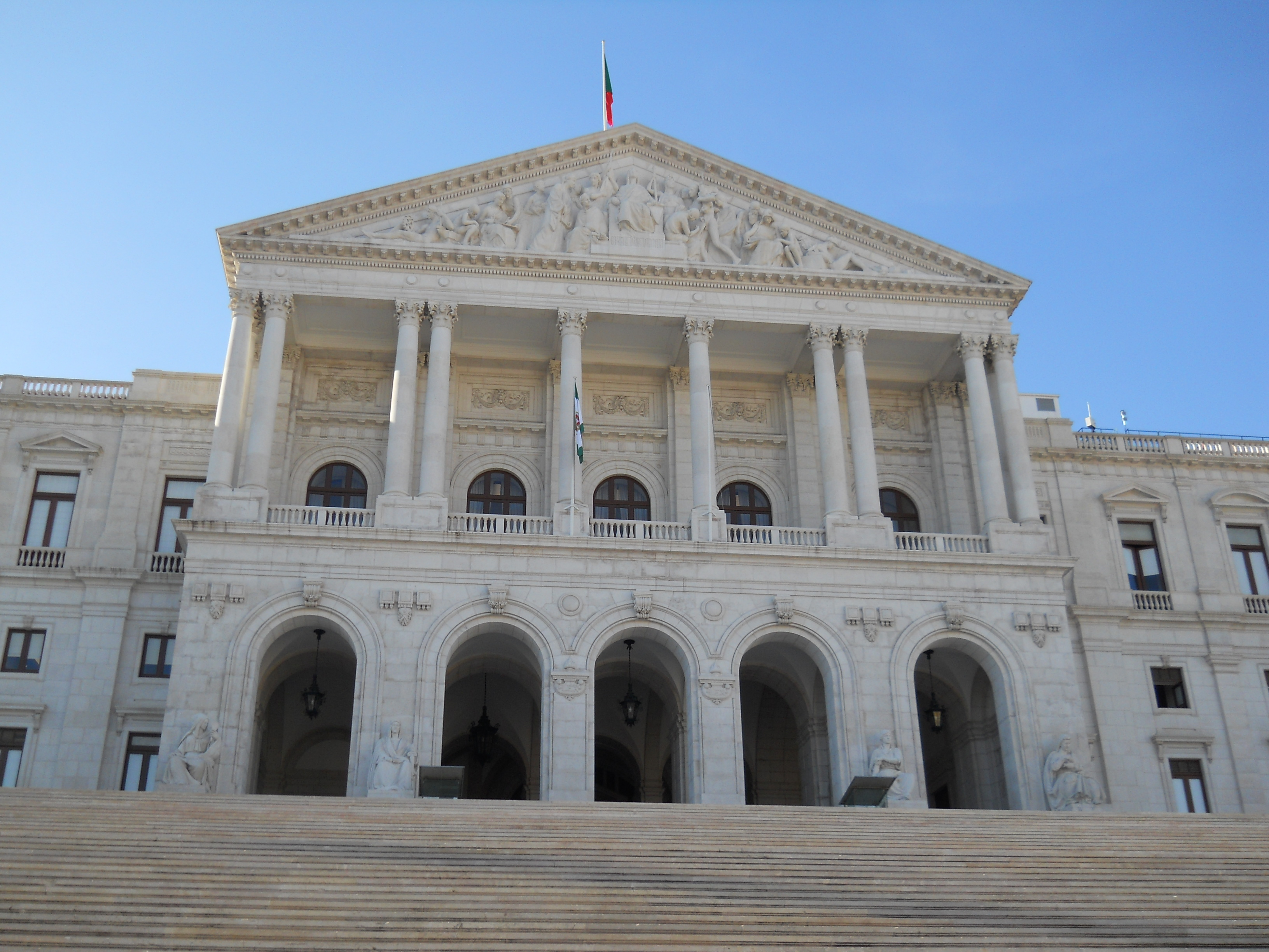 Lisbon Portugal 114 The Palácio de São Bento